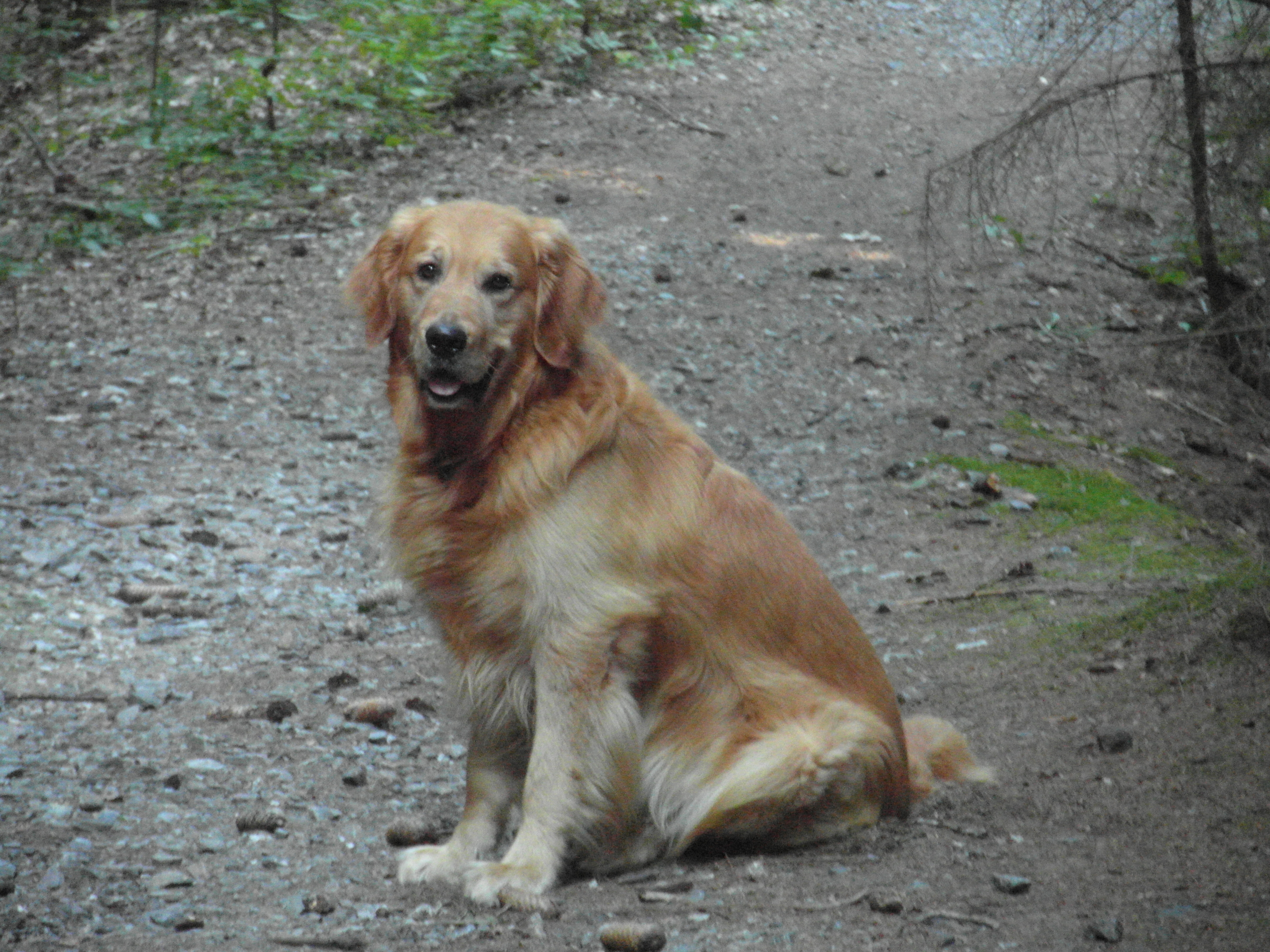 A Golden Retriever.